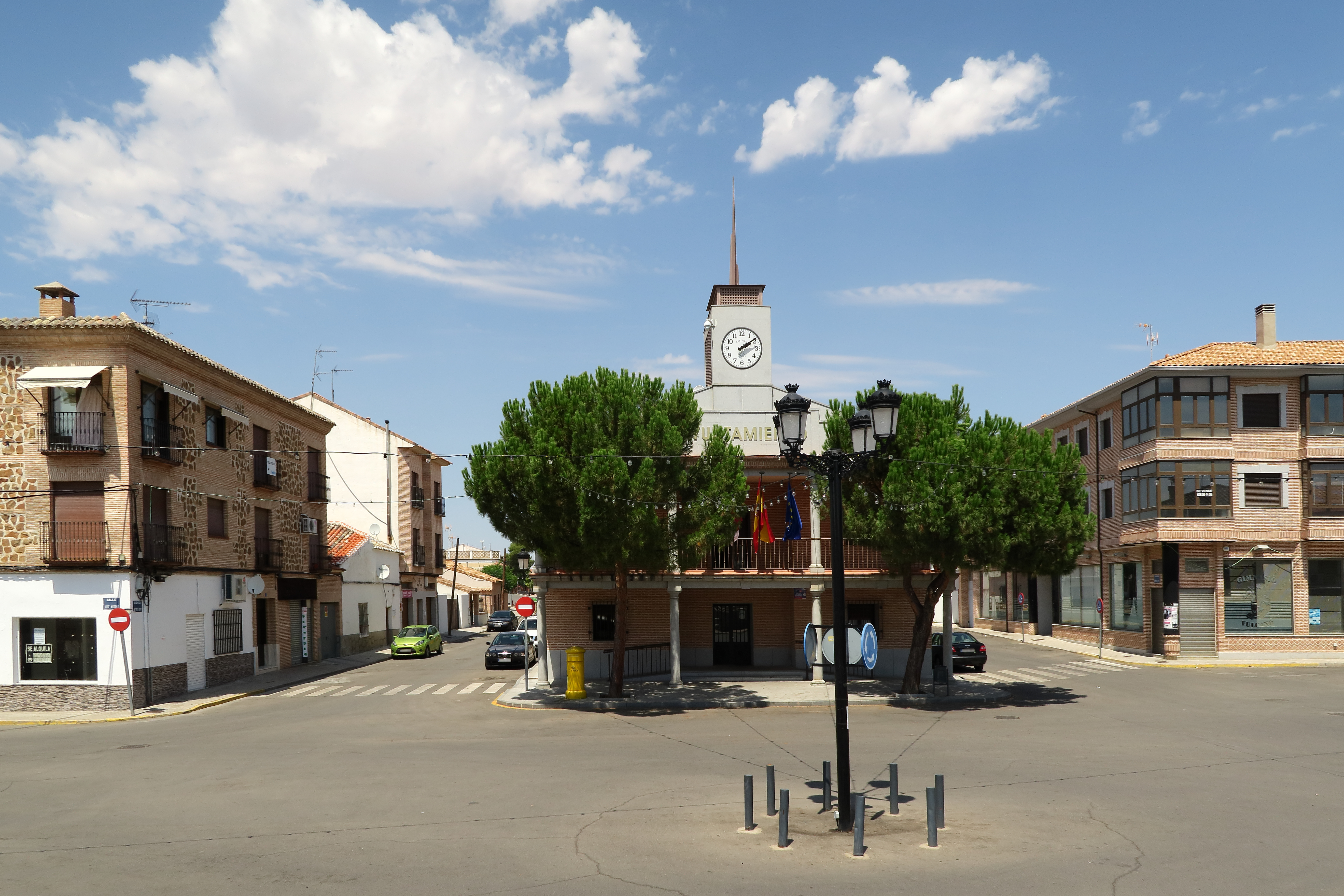 Ayuntamiento de Magán